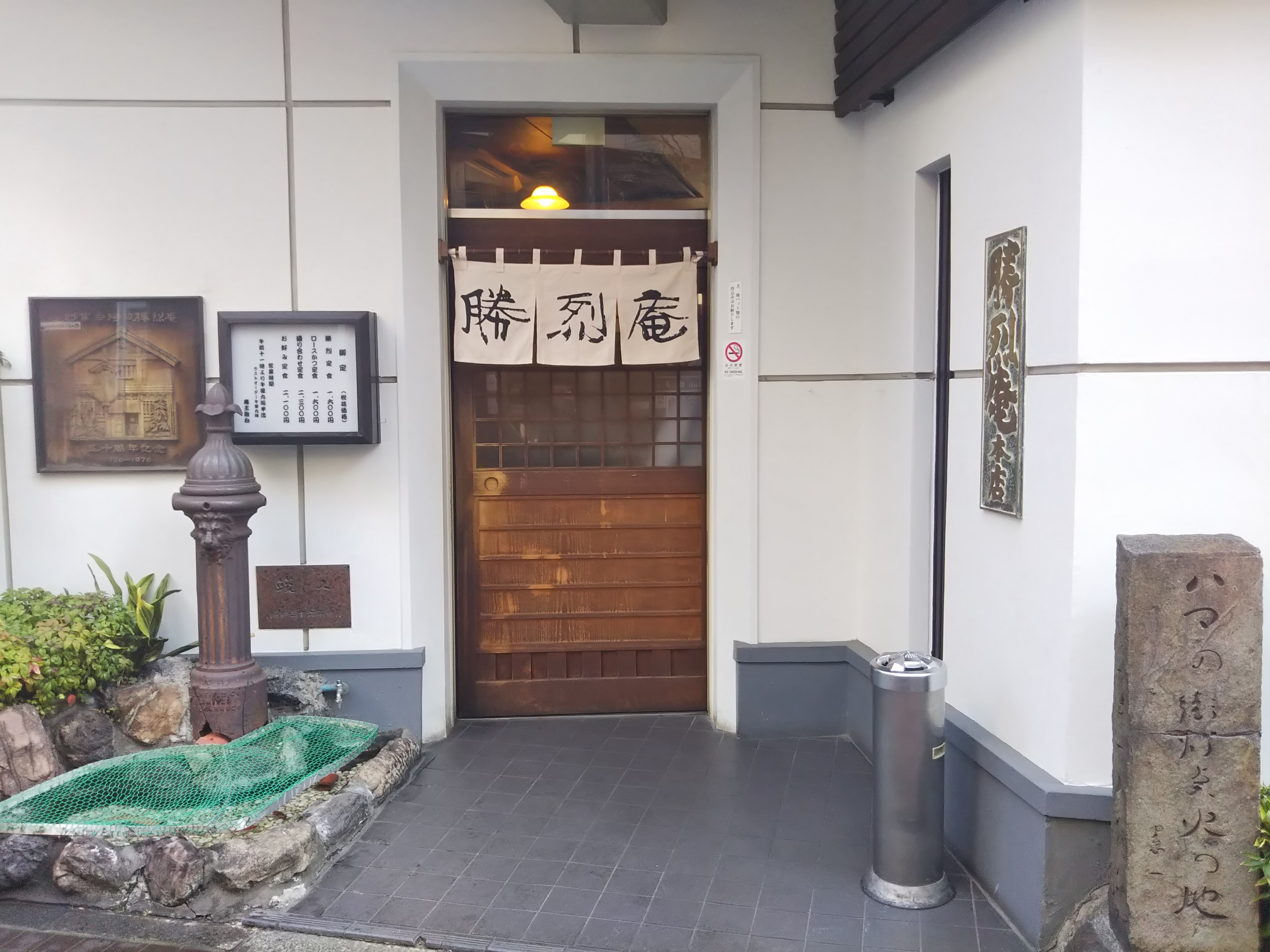 横浜市中区常盤町、勝烈庵馬車道総本店の店舗入口。左側に開店当時の店舗をかたどった木組みと獅子頭共用栓、右側には「ハマの街灯点火の地」の碑。暖簾の文字は棟方志功の書。